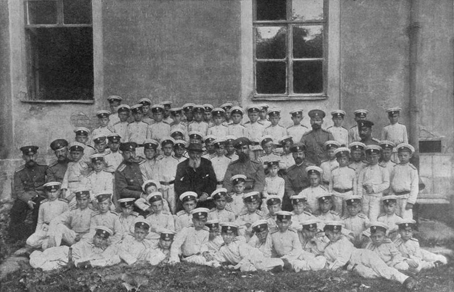 Кадет I выпуска Воронежского великого князя Михаила Павловича кадетского корпуса Алексей Сергеевич Суворин среди кадетов Михайловского корпуса.